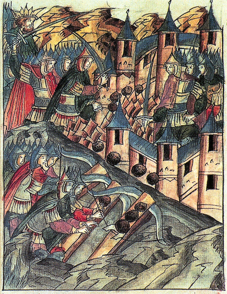 Defense of Kozelsk. Miniature from Kozelsk letopis.